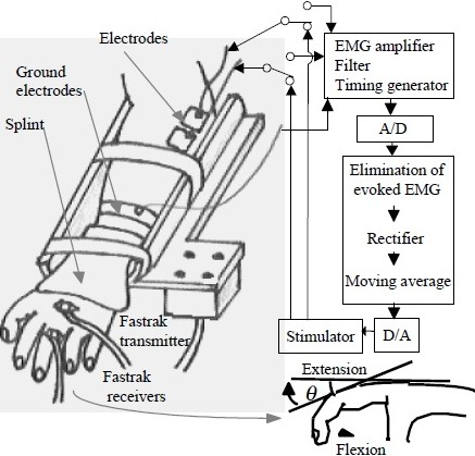 手関節装具を併用し手指伸展回復用に開発されたIVES初号機[1]。